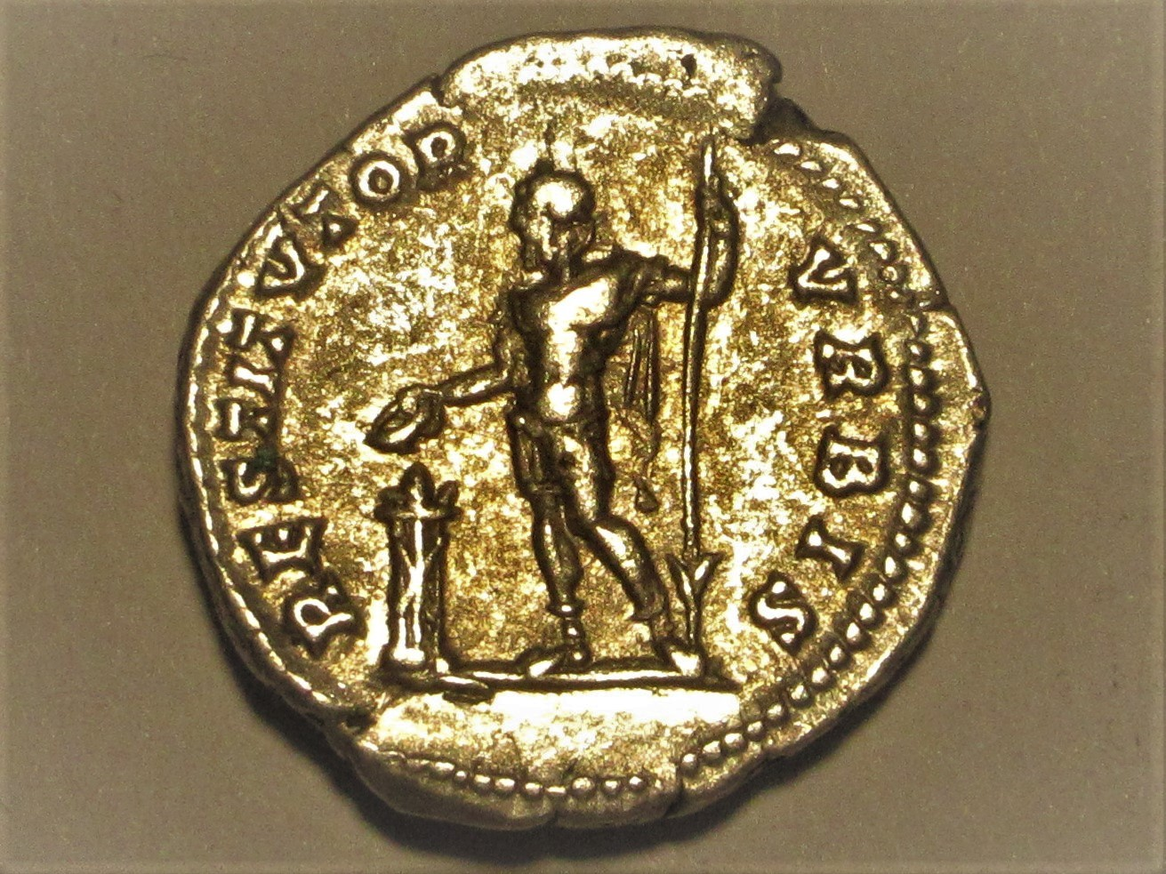 RESTITVTOR VRBIS auf Denar des Septimius Severus, Kampmann 49.159.2